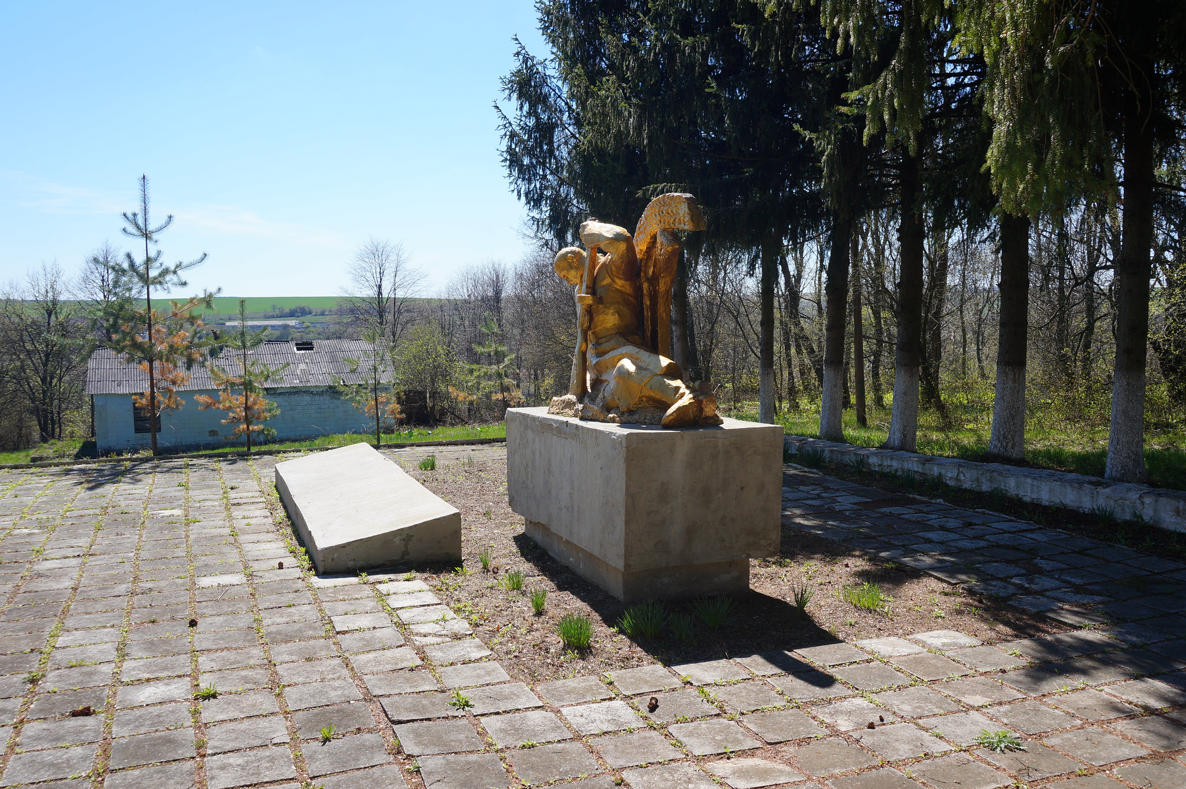 Пам’ятник 176 воїнам –односельчанам, загиблим на фронтах ВВВ, Рів, біля Будинку культури